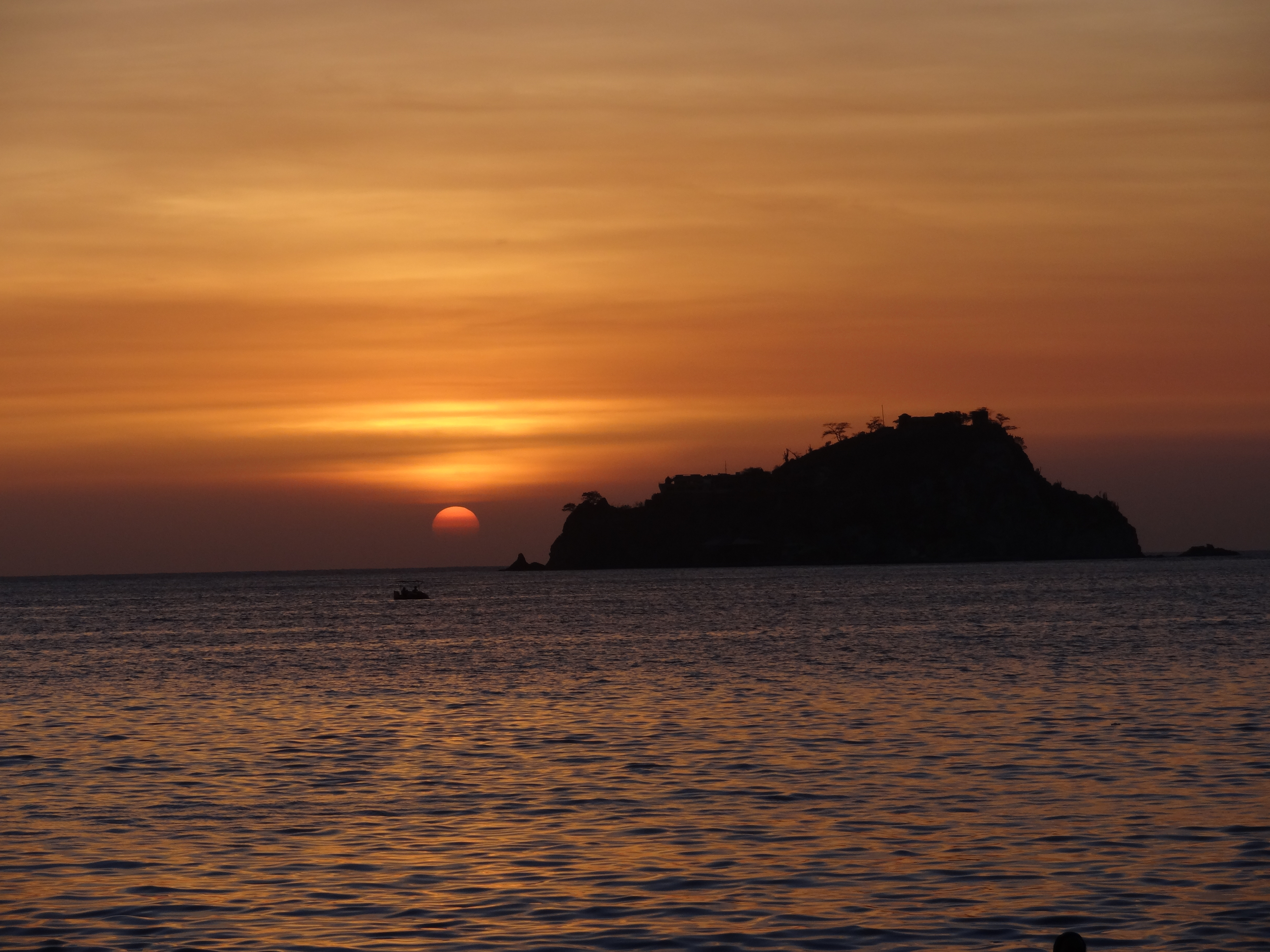 atardecer en Santa Marta playa El Rodadero